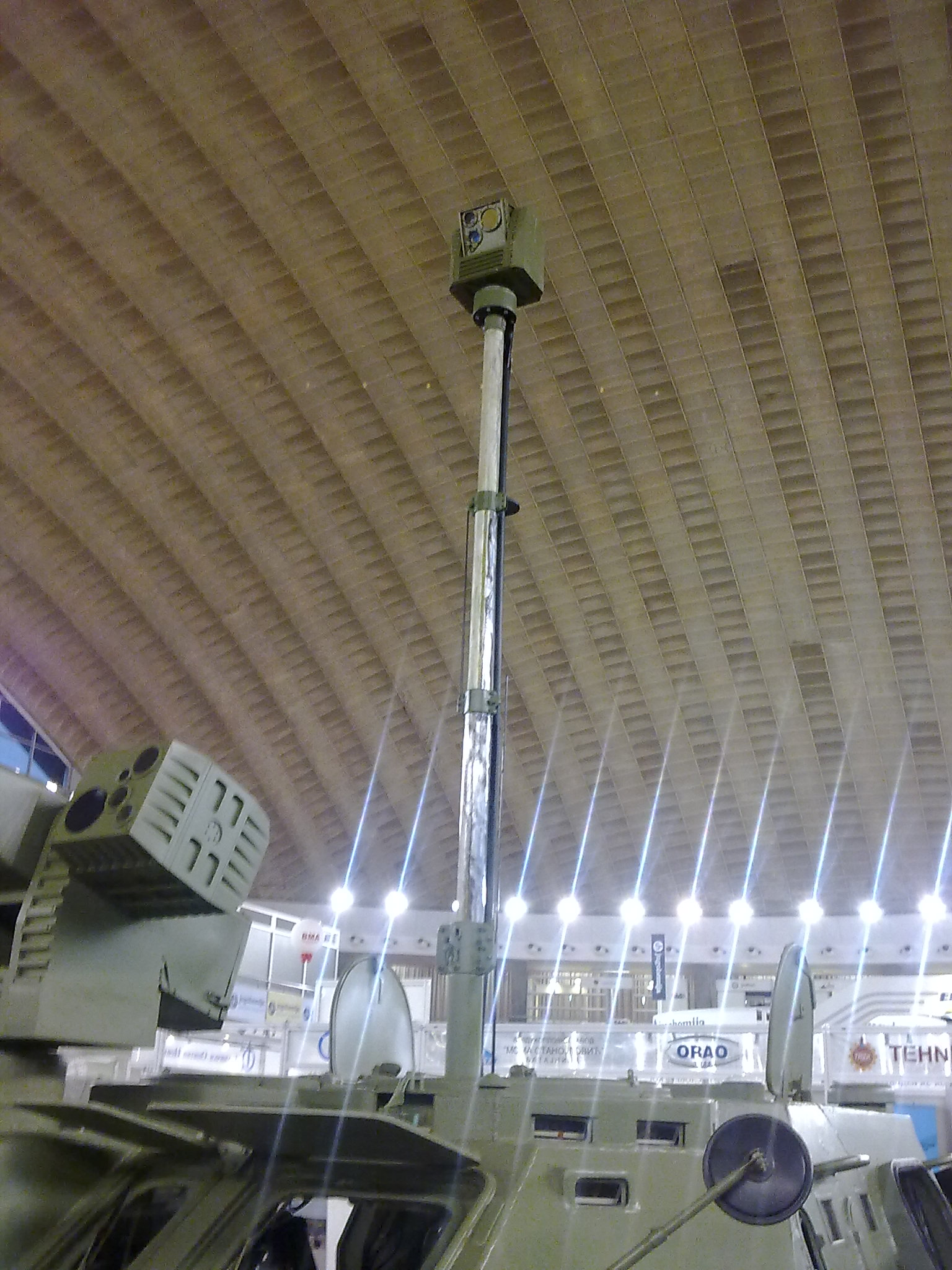 Уређај ТОМС на возилу Курјак ВС